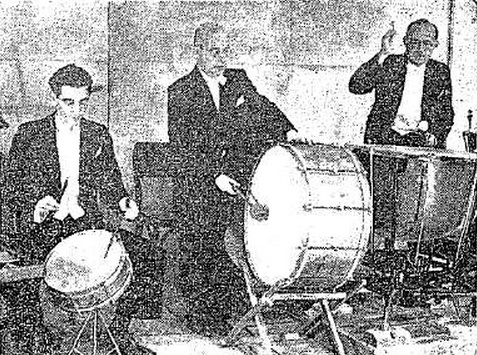 נגני כלי ההקשה דב גינצבורג, ישראל סגל, ל' גרינוולד